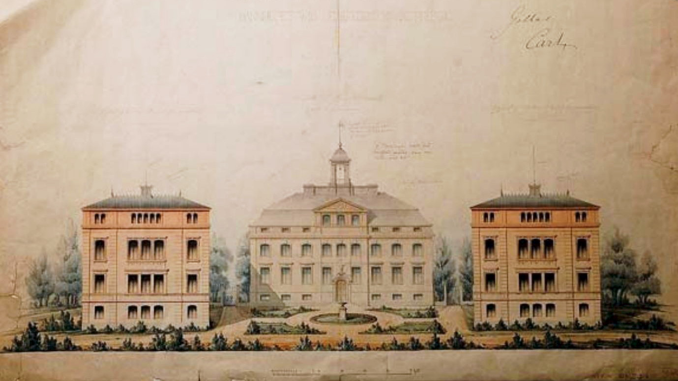 Kristinebergs slott fasadritning av arkitekt Johan Fredrik Åbom.